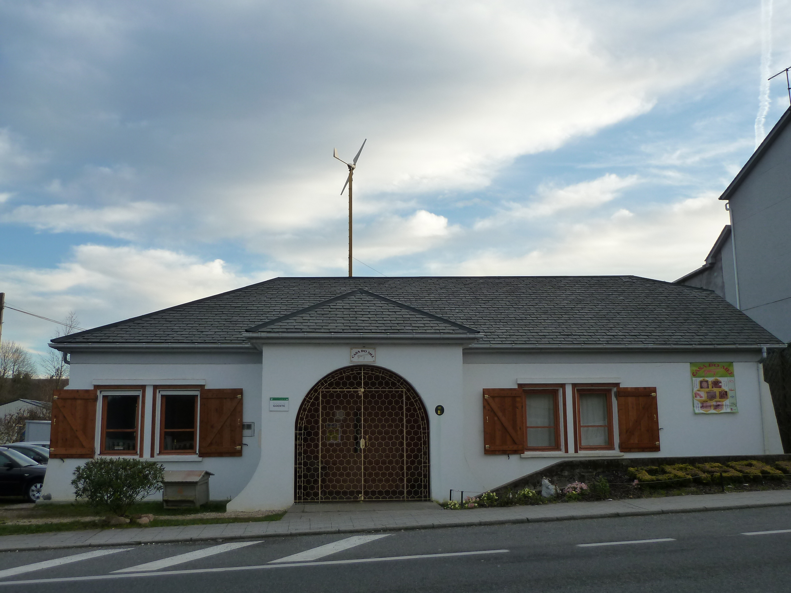 Casa do Mel en Goente (As Pontes de García Rodriguez). Museo sobre o mel, as abellas e a apicultura.